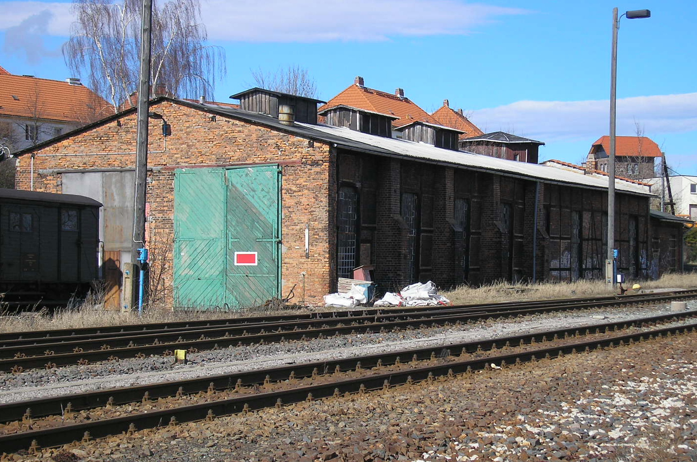 Der Lokschuppen am Ilmenauer Bahnhof.